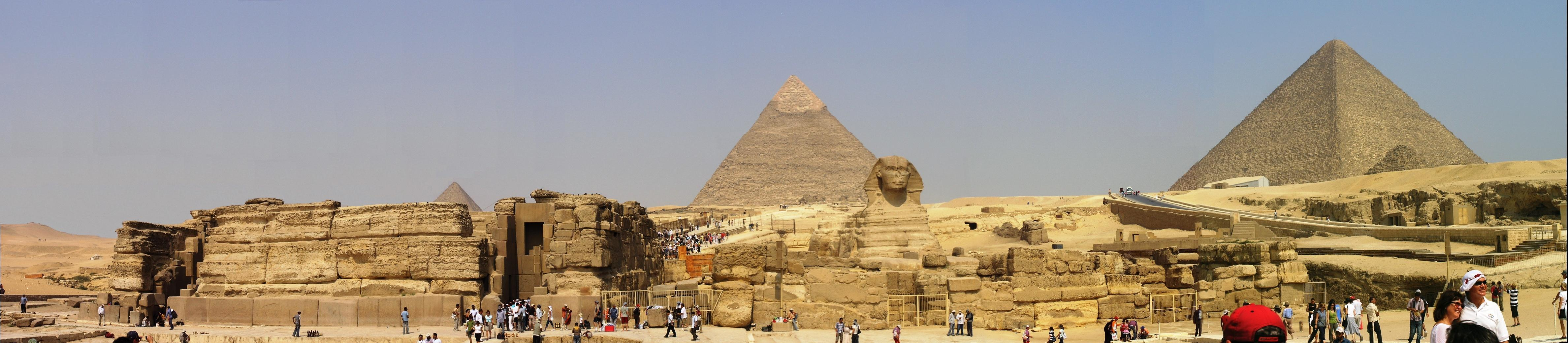 Giza Plateau - Sphinx panorama